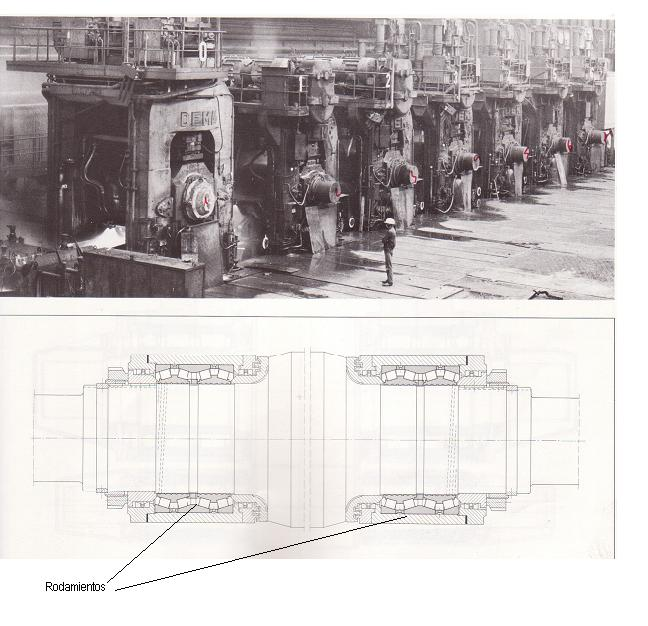 Conjunto de cajas de laminación y Rodamientos